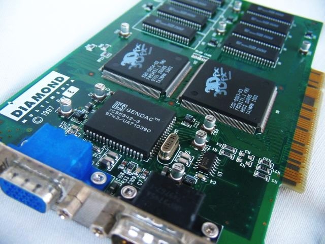 Bildbeschreibung: Diamond Monster 3D Addon-Karte, Voodoo Graphics Chipsatz Quelle: selbst fotografiert Fotograf/Zeichner: Ratzzz Datum: 03.03.2006 Sonstiges